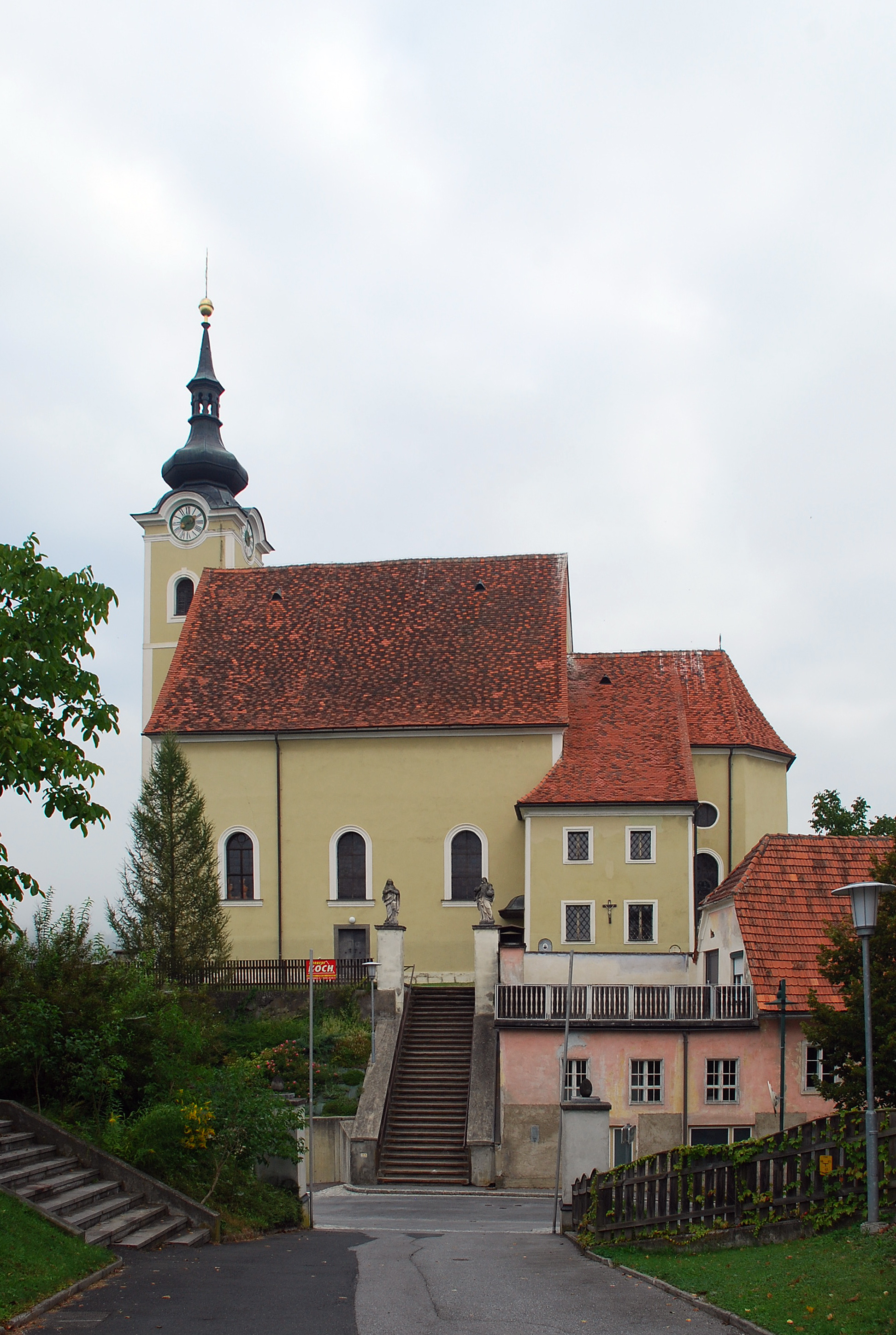 Preding, Weststeiermark: Pfarrkirche vom Süden aus